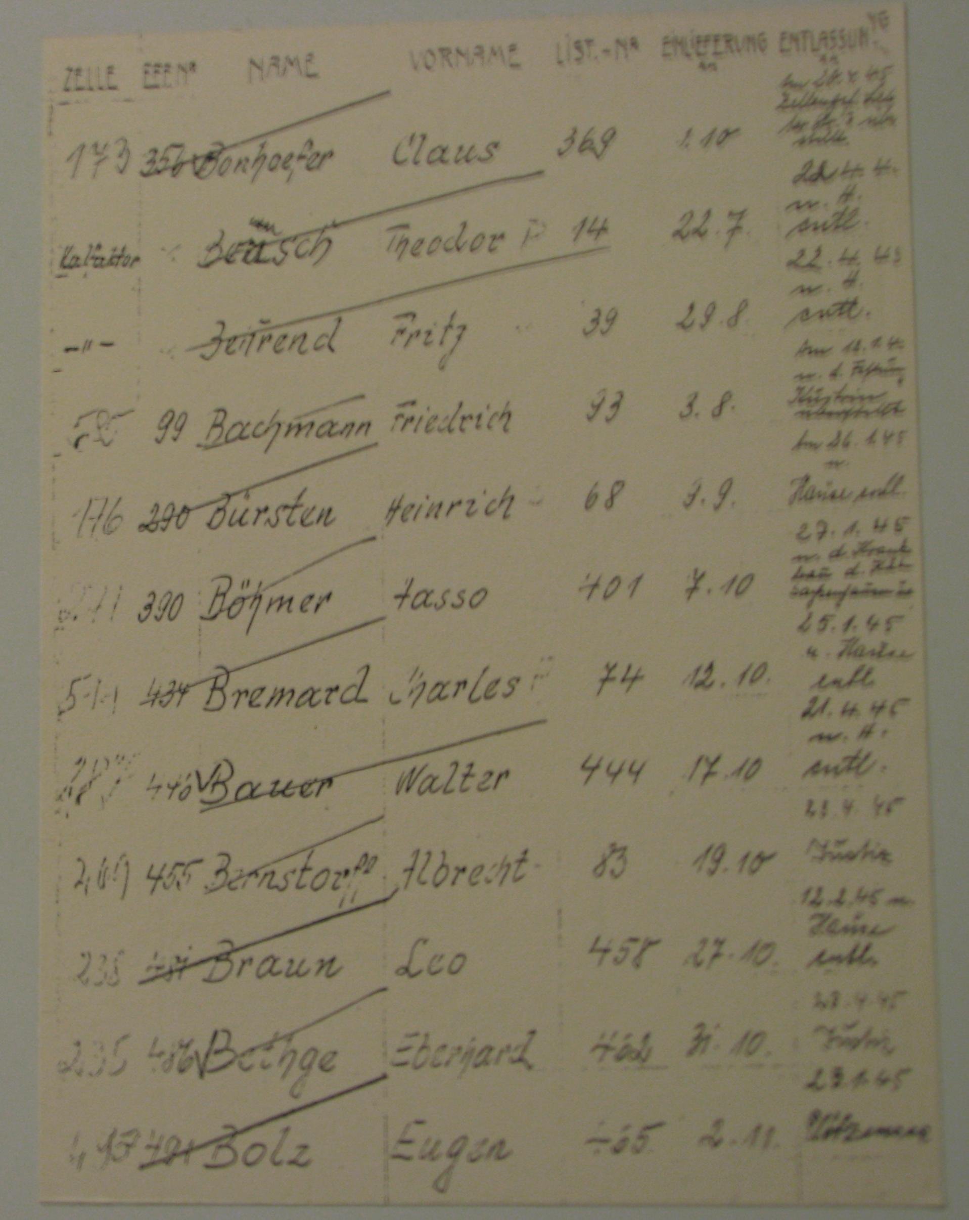 Auszug aus dem Haftbuch des Zellengefängnis Lehrter Straße, das am 23. April 1945 geschlossen wurde. Ausgestellt in der Gedenkstätte Deutscher Widerstand.